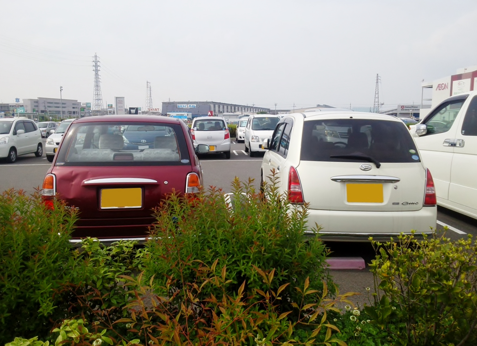 ダイハツ・ミラジーノのL700S型とL650S型をそれぞれリアから撮影。